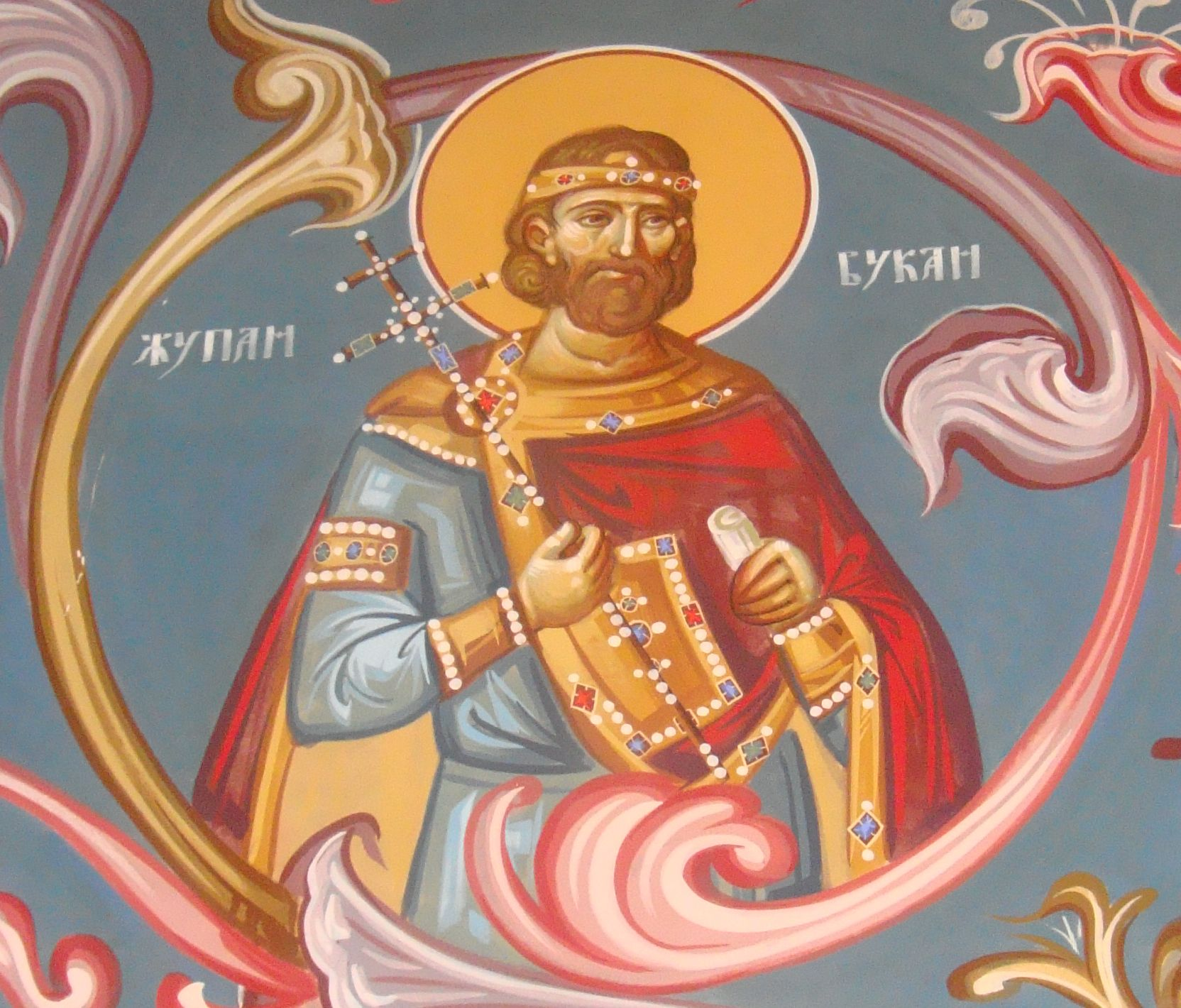 Српски (ћирилица): Рашки жупан Вукан. Новија фреска из цркве у Прилужју, настала око 2008. године.